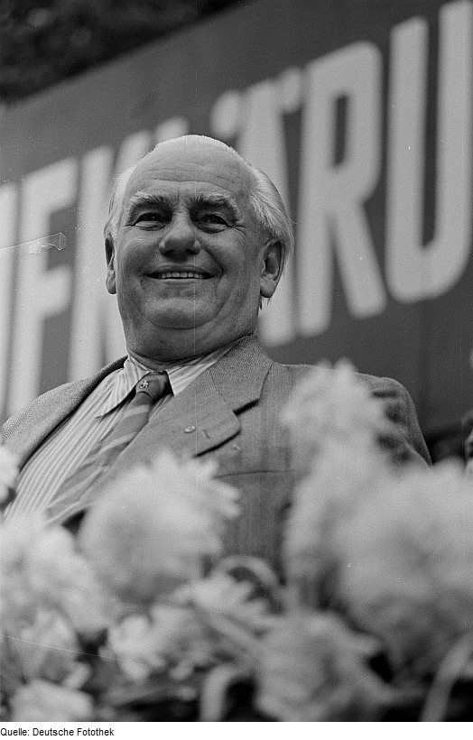 Original image description from the Deutsche Fotothek Wilhelm Pieck auf der Demonstrationstribüne